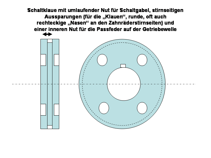 Skizze 4 einer Klauenschaltung